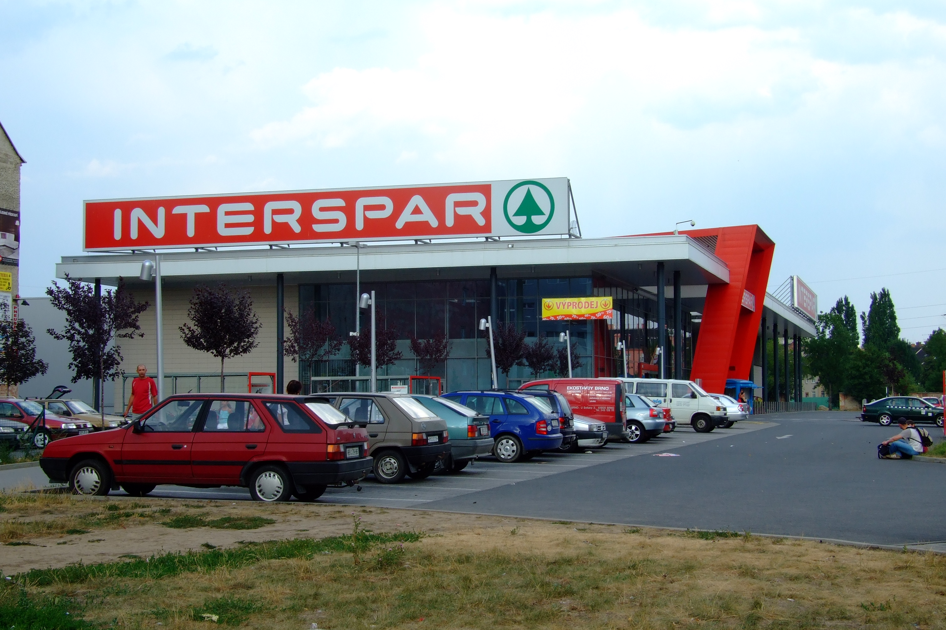 Brno-Zábrdovice - hypermarket Interspar